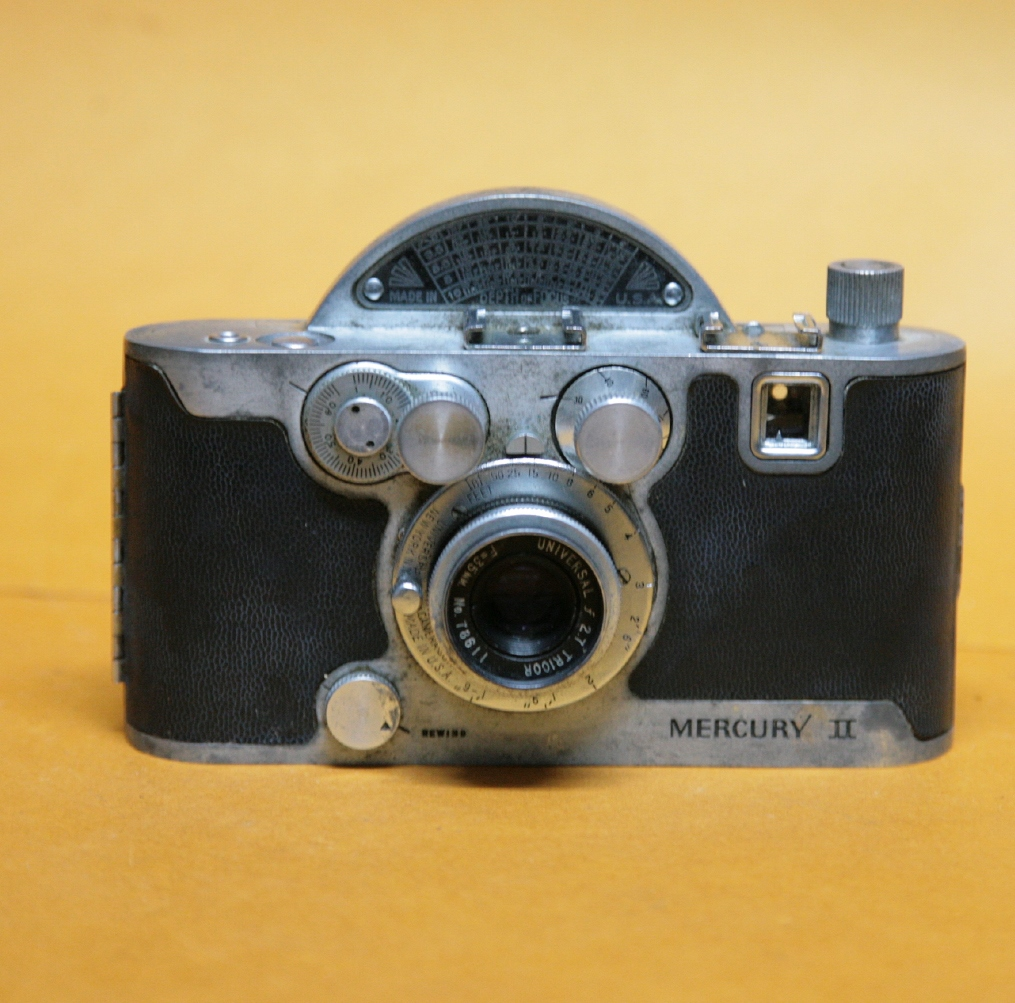 Coll. Marcè CL - Mercury 2 1945 con otturatore rotante Model CX.